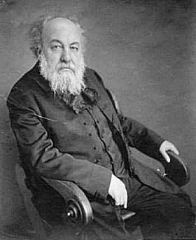 Portrait of Mikoláš Aleš, Czech painter